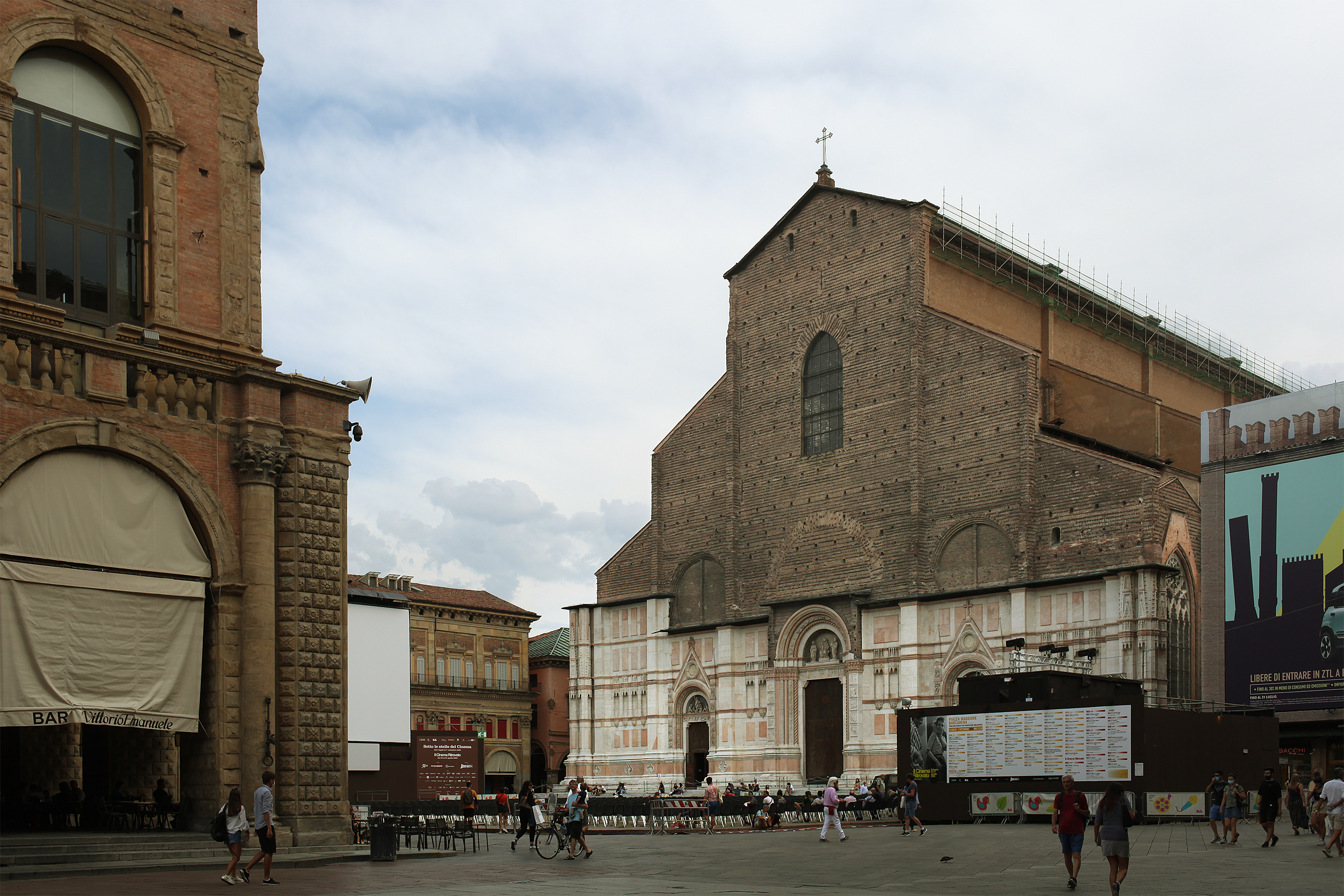 Veduta della Basilica di San Petronio, Bologna. A sinistra uno scorcio di Palazzo Re Enzo